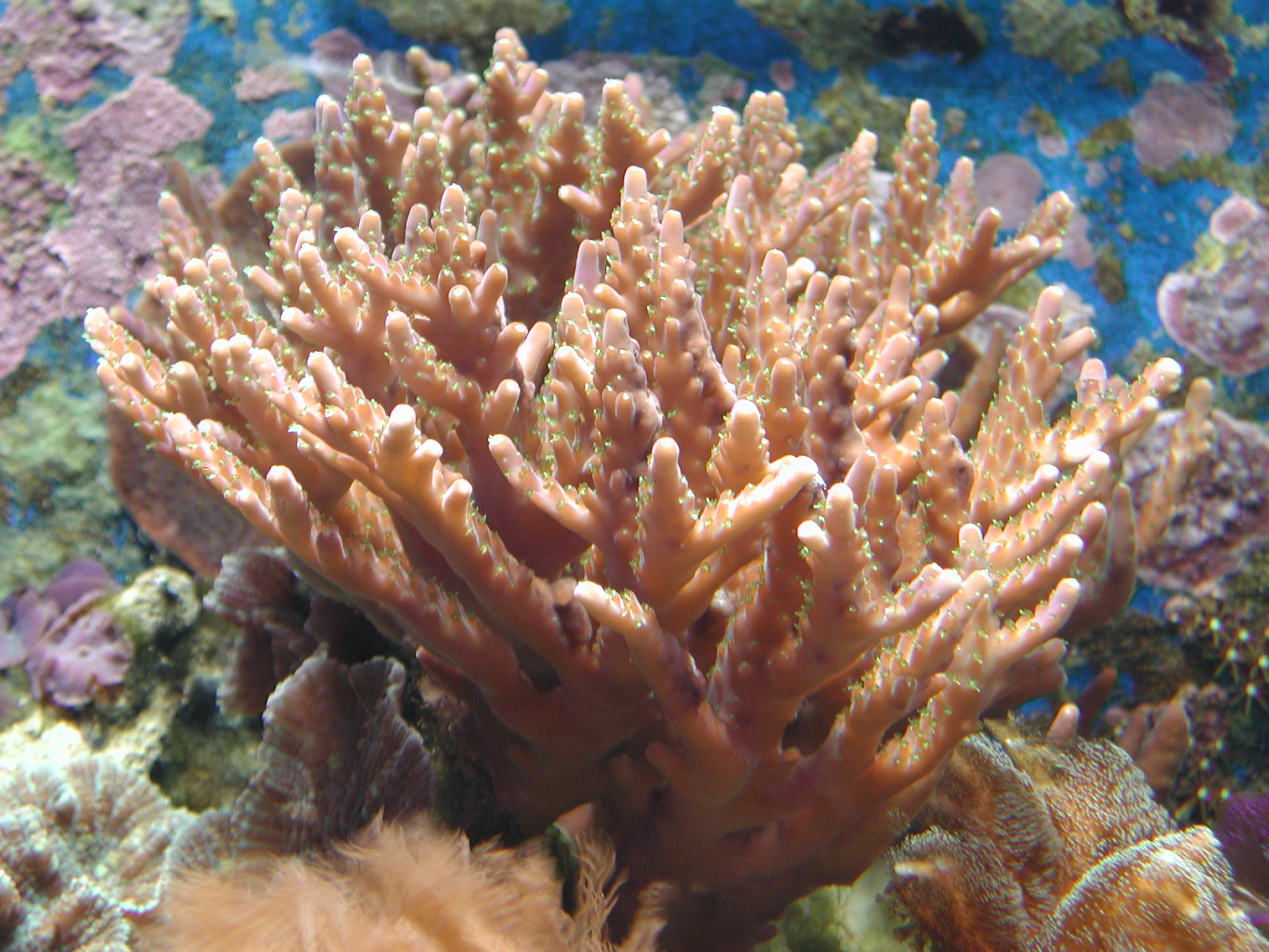 Acropora (David Excoffier)